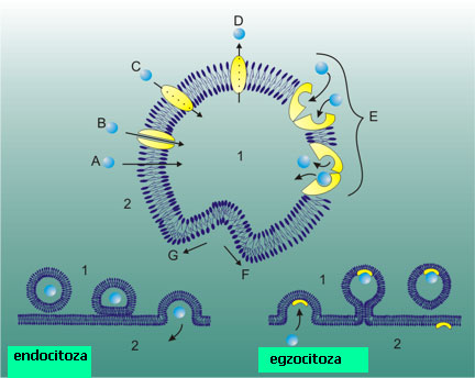 слика је са вики оставе и на њој је исправљена грешка (замена егзоцитозе и ендоцитозе) Слику изворно направо :de:User:Zoph, преправила Корисник:Тснена. Licensing Template:+GFDL-disclamers